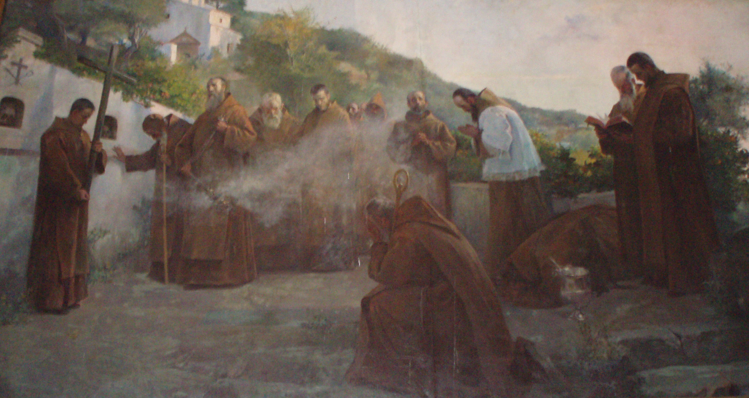 "Plegaria en las ermitas de Córdoba". Lienzo de Tomás Muñoz Lucena, con el que consiguió la primera medalla de la Exposición Nacional de 1901. Se encuentra colocado en las escaleras que comunican el claustro del antiguo Convento de la Merced de Córdoba con la planta superior del edificio.